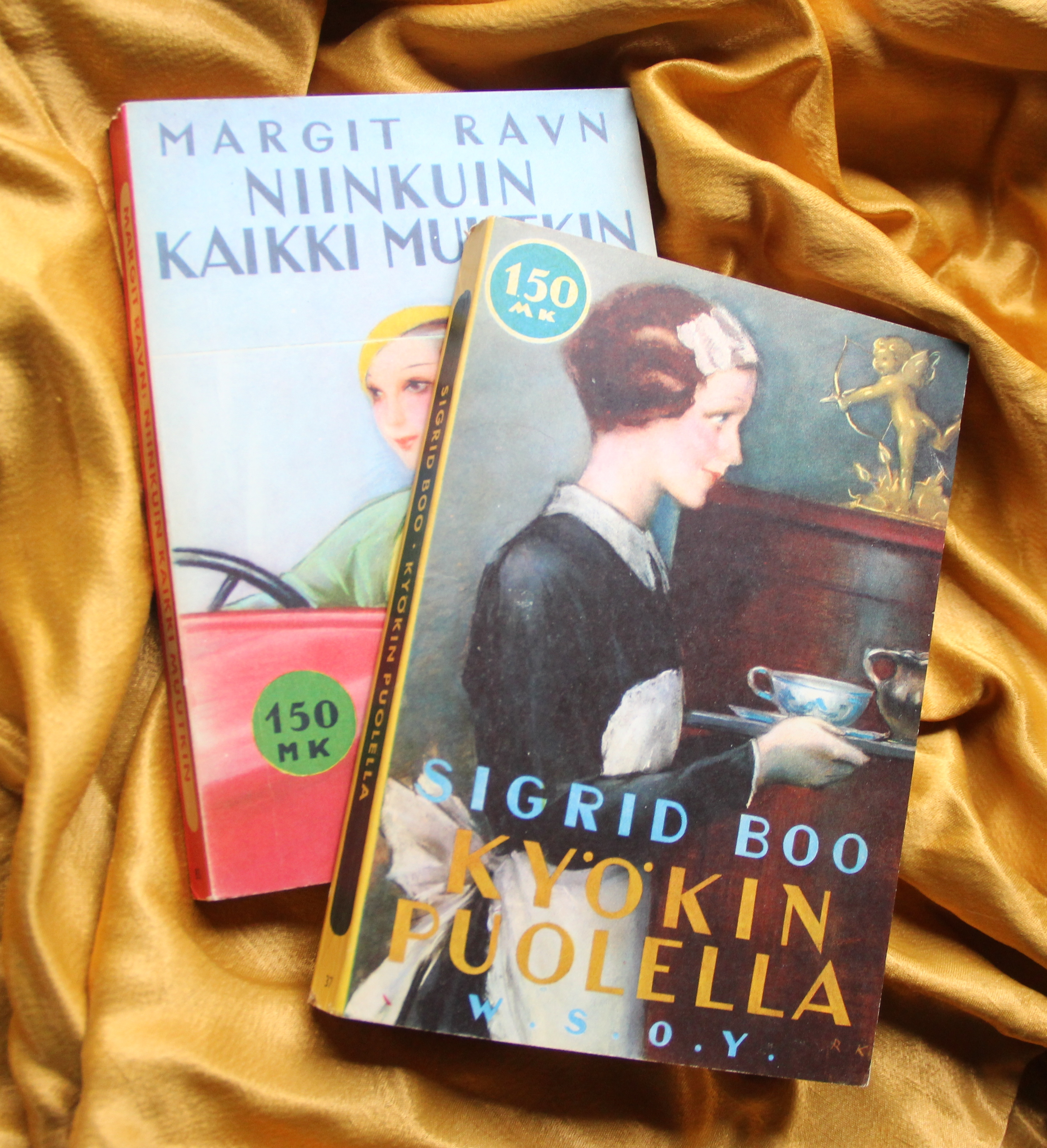 Rudolf Koivun Riksin sarjaan tekemiä kansikuvia